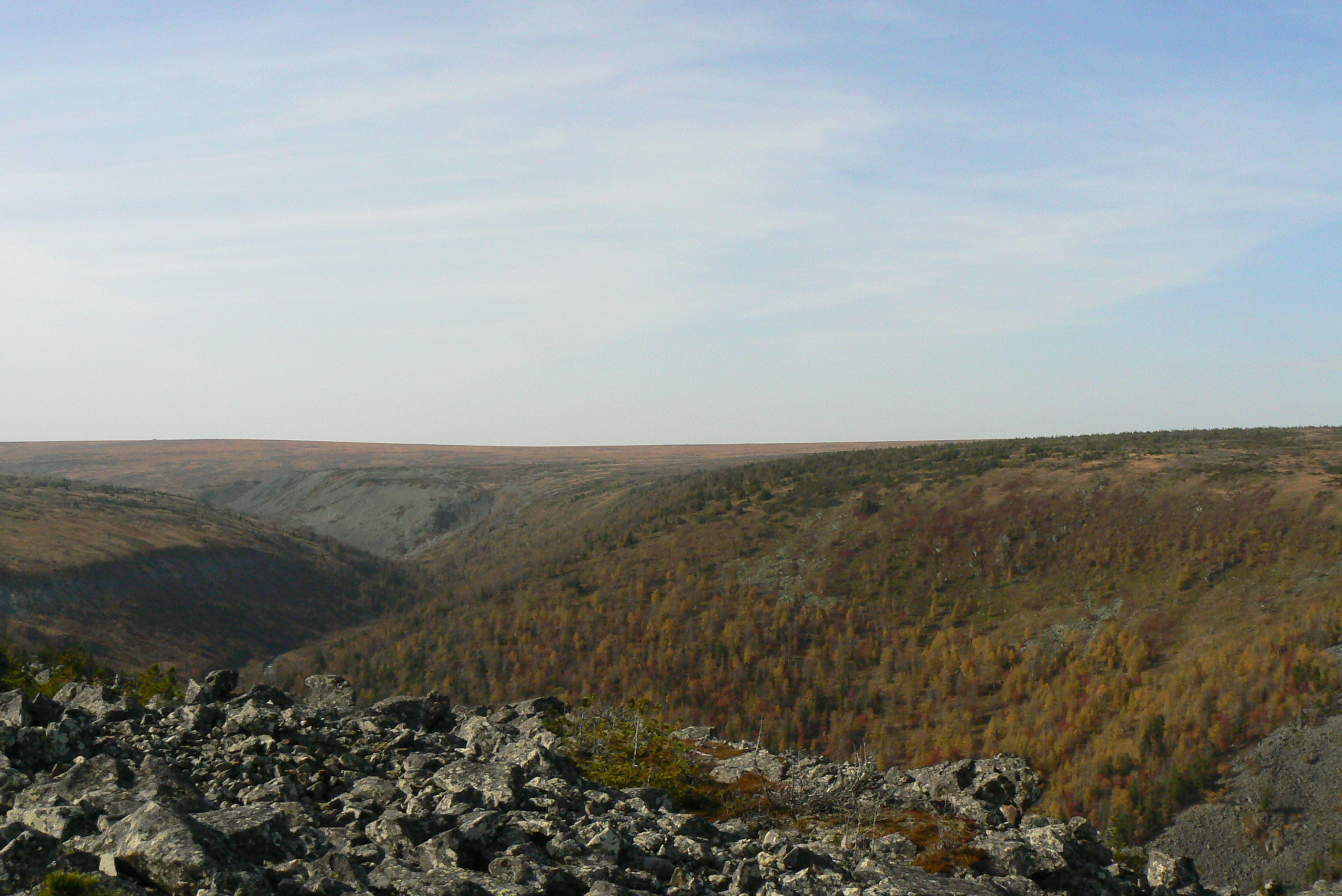 Один из многочисленных видов хребта Кваркуш. Снимок сделан с безымянной возвышенности высотой около 900 м над уровнем моря. This image is related to the protected area of Russia number 5910193